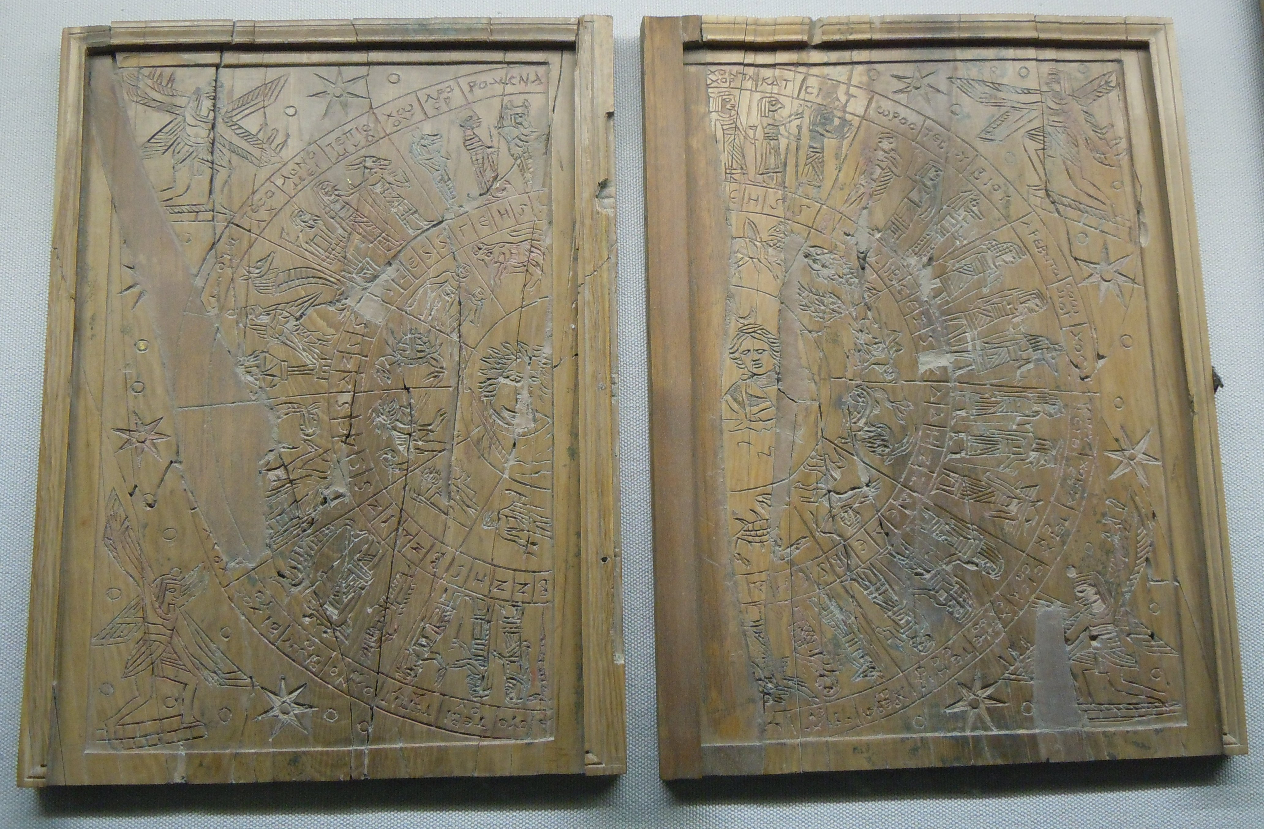 Tablette zodiacale de Grand (Vosges) - Musée d'archéologie nationale de de Saint-Germain-en-Laye (France) - II ème siècle apres JC - découvertes en 1968 .